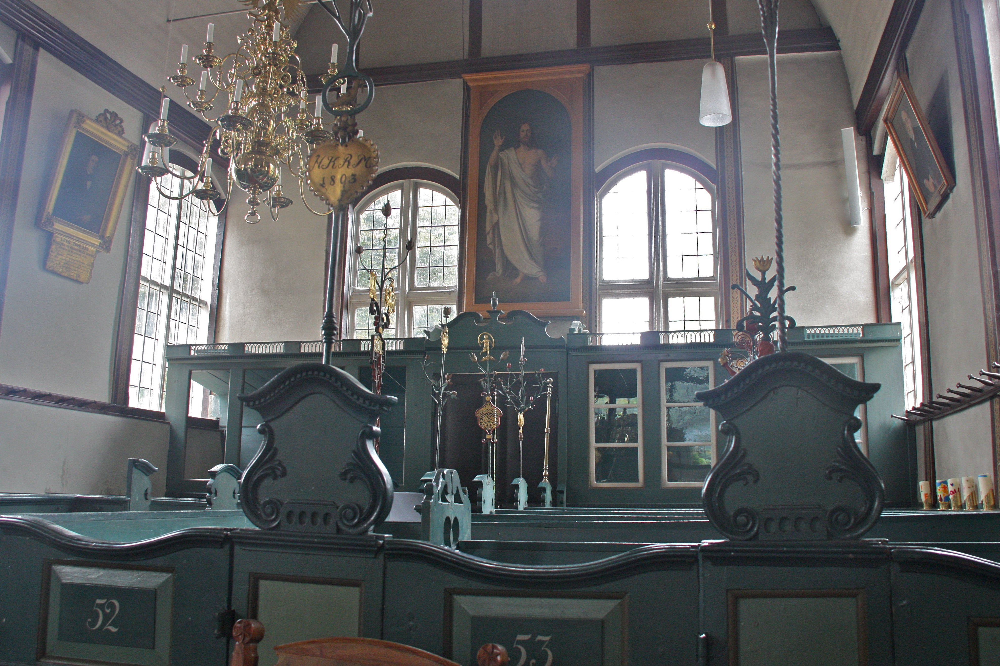 Hamburg, Curslack, St. Johannis-Kirche, Innenansicht des SeitenschiffsThis is a photograph of an architectural monument.